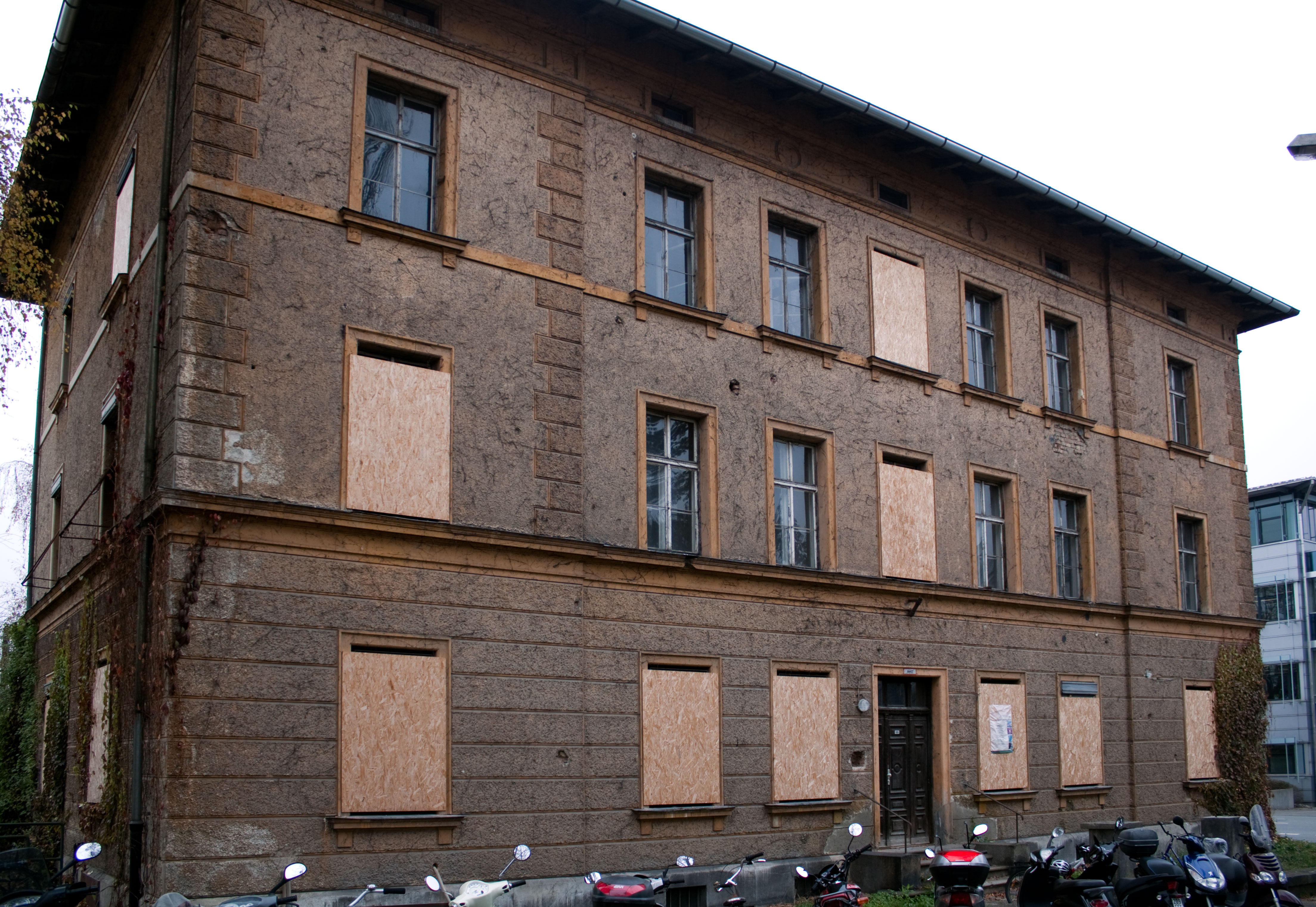 Ehemaliges Oberbahnamt Rosenheim 2011